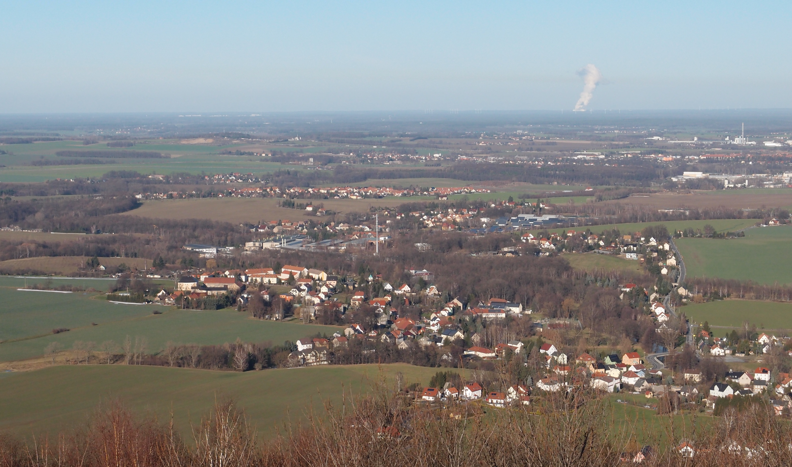 Blick vom Aussichtsturm des Mönchswalder Berges über Obergurig bis zum Kraftwerk Schwarze Pumpe